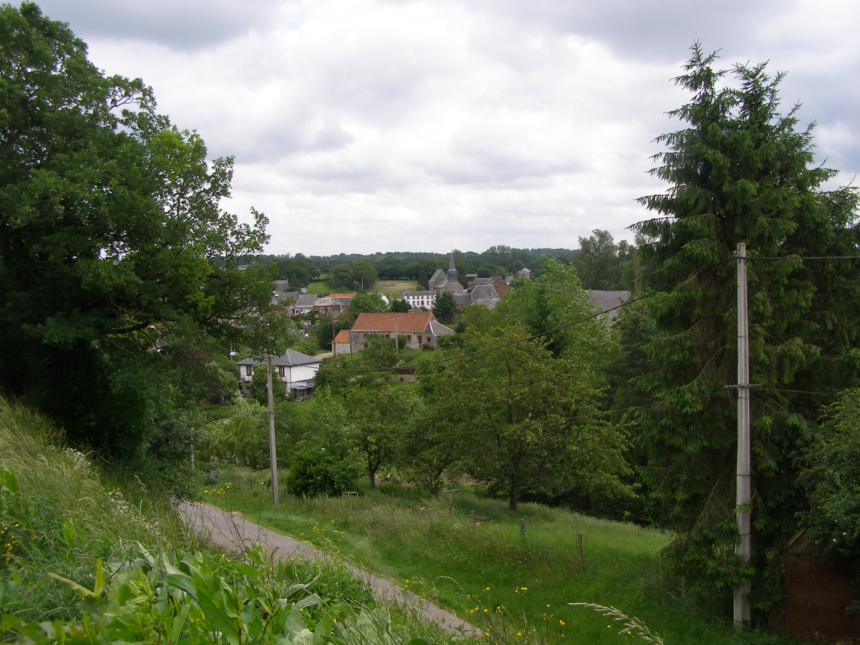 Vue d'ensemble de Dimont.